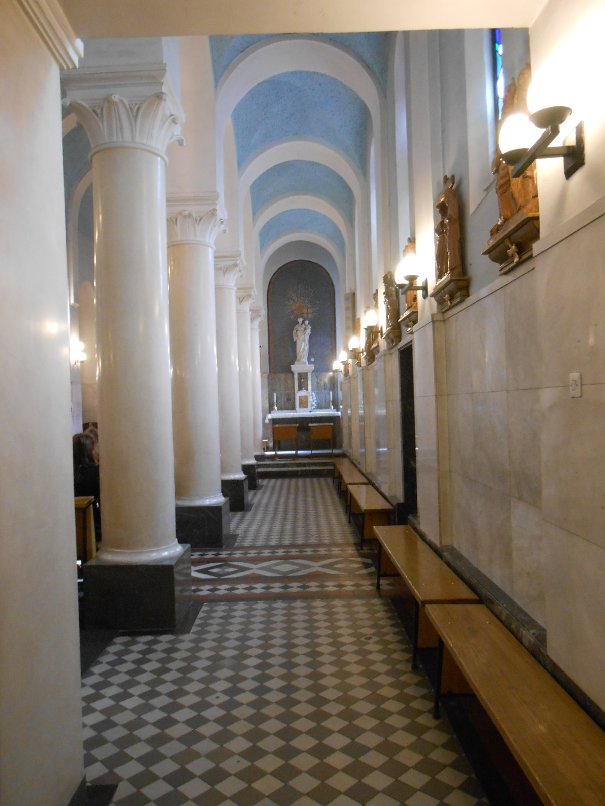 Brod crkve Krista Kralja u Beogradu